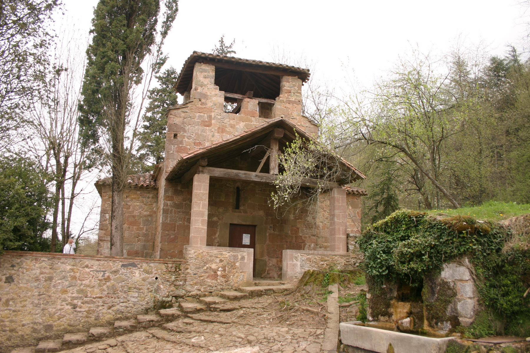 Església de Sant Andreu de Socarrats (la Vall de Bianya)